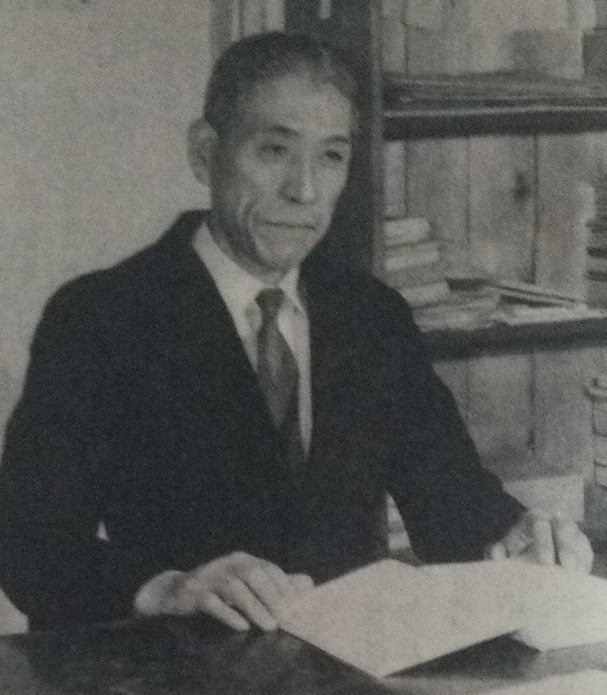 宮崎周一